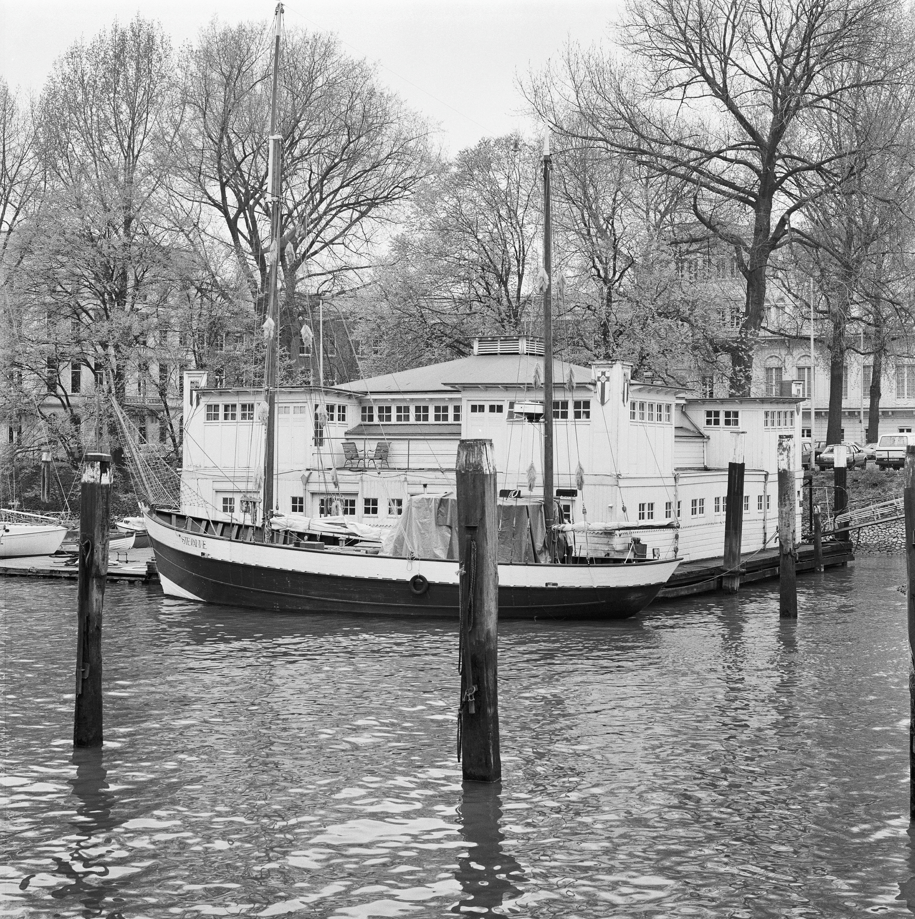 Exterieur OVERZICHT